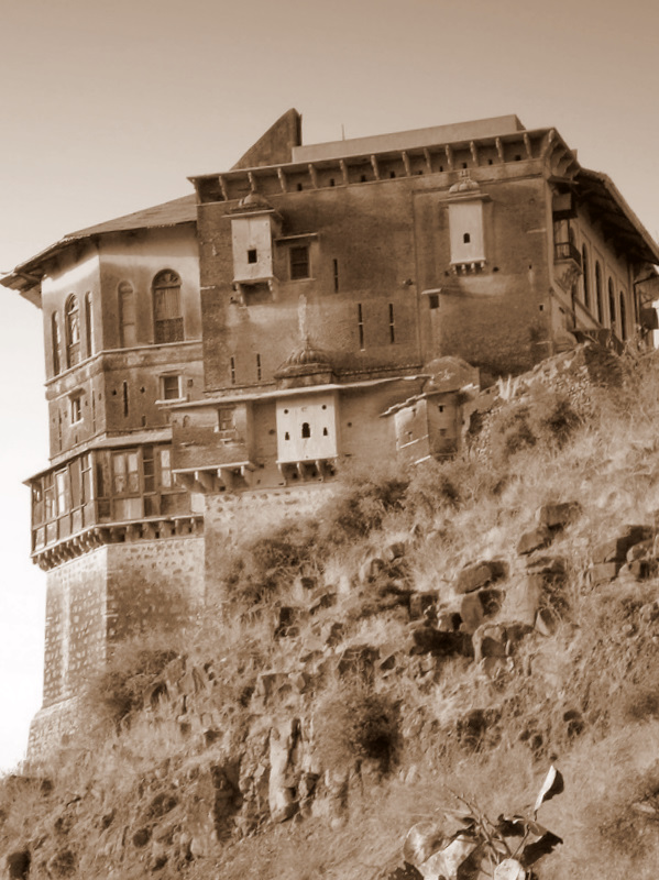 ध्वस्त हो चुके प्रतापगढ़-किले में पुराना राजमहल